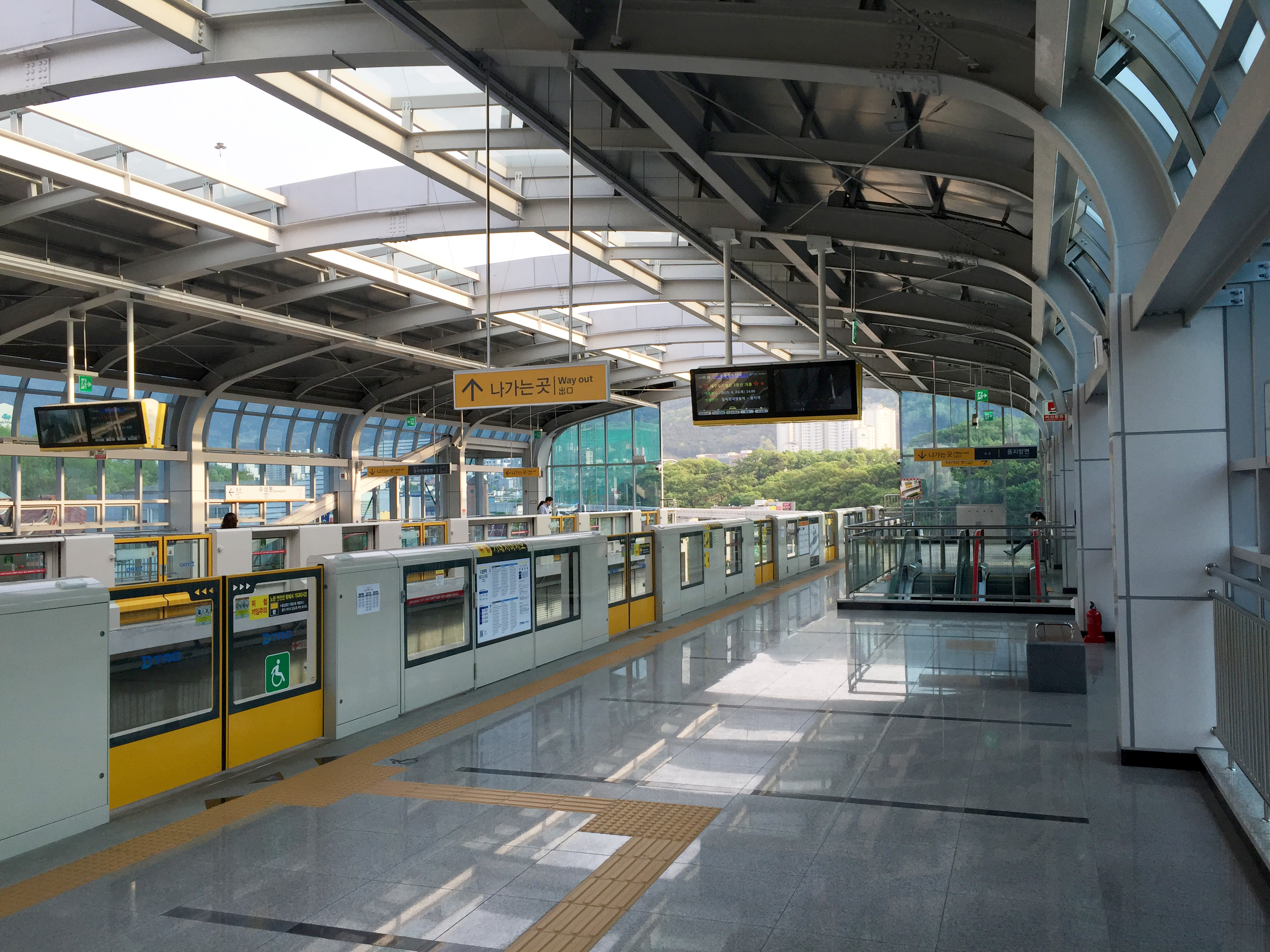 수성못(TBC)역 승강장